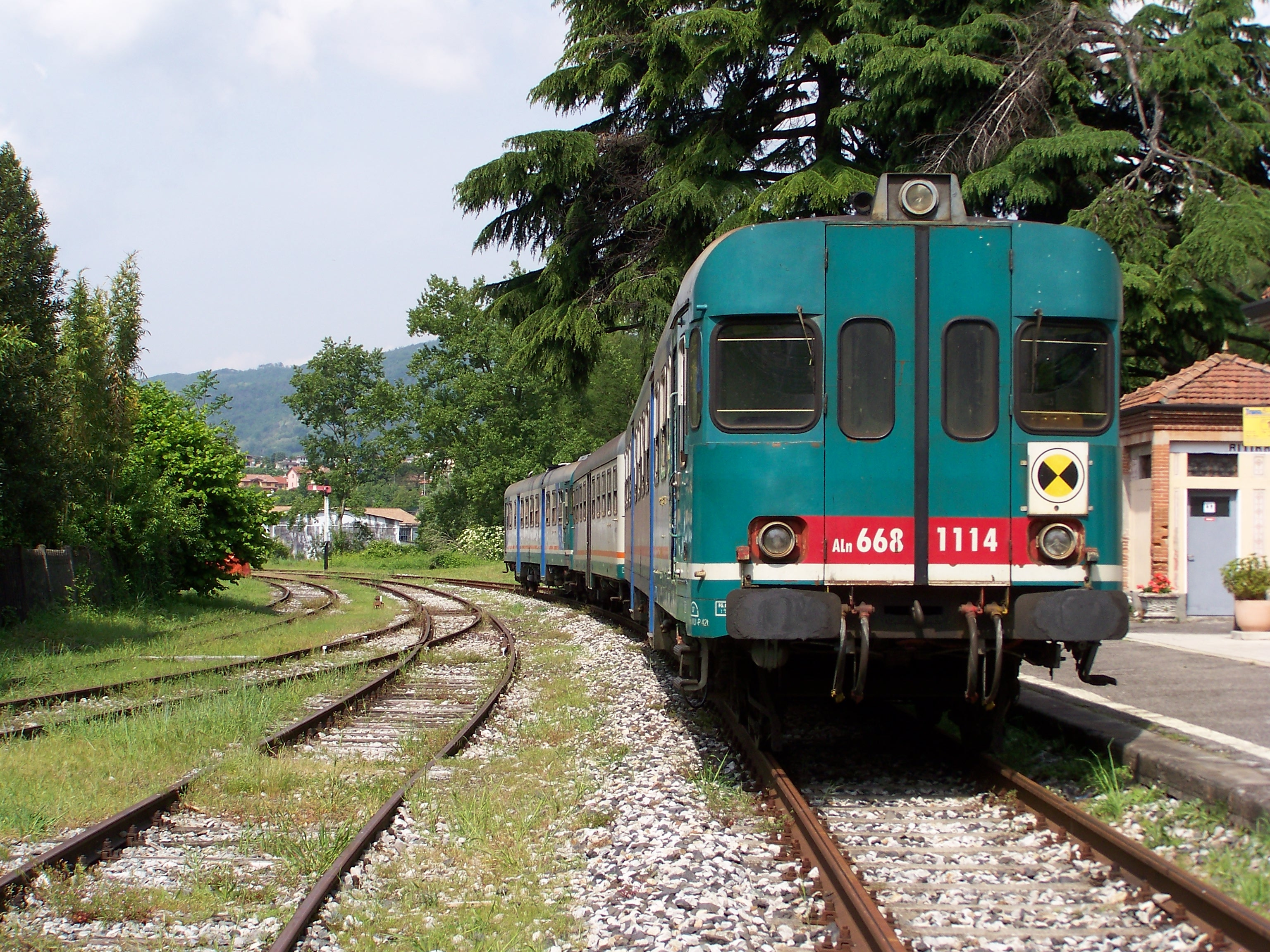 La composizione di ALn 668.1111+Ln 664.1412+ALn 668.1114 del TrenoBlu in sosta al primo binario della stazione di Paratico-Sarnico il 10 maggio 2009.